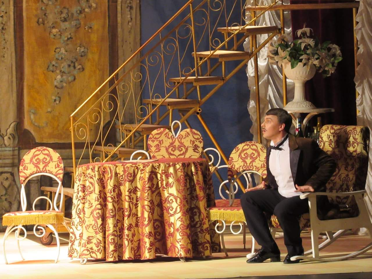 Летюча миша, м.Київ,Театр оперети